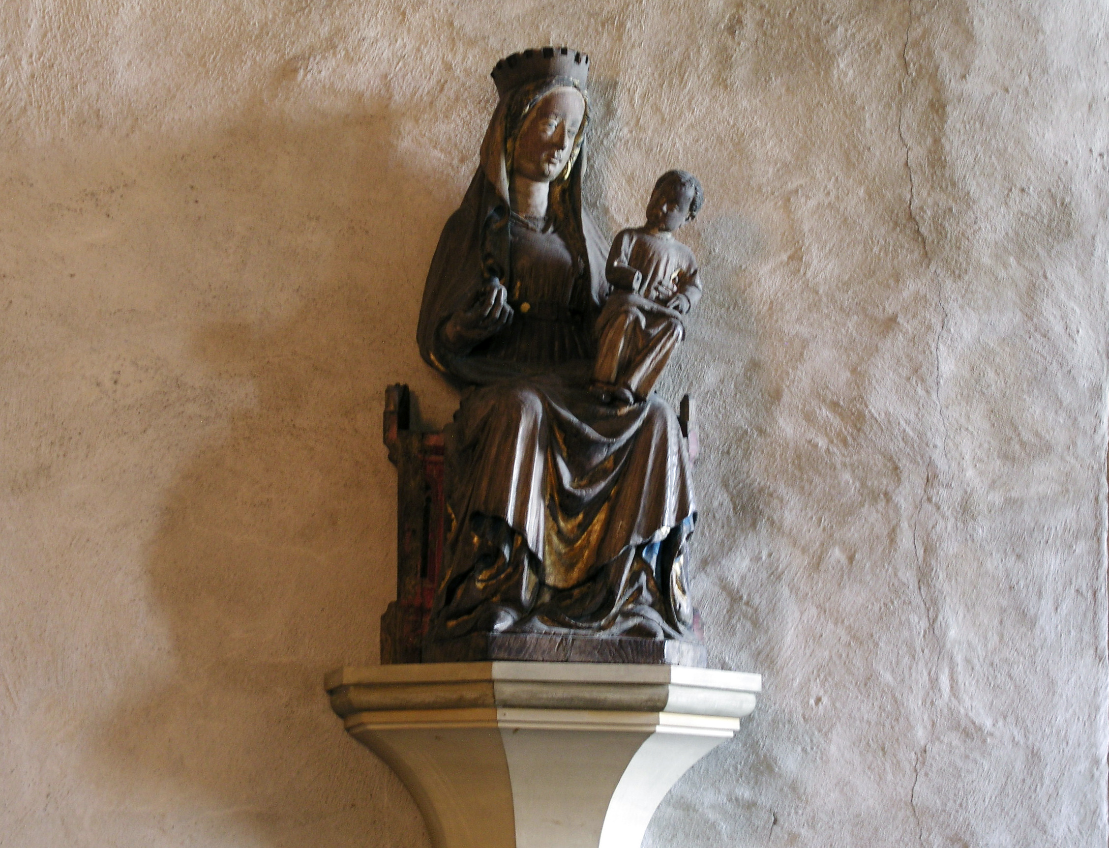 Heda kyrka, Diocese of Linköping, Ödeshögs kommun. Statue.